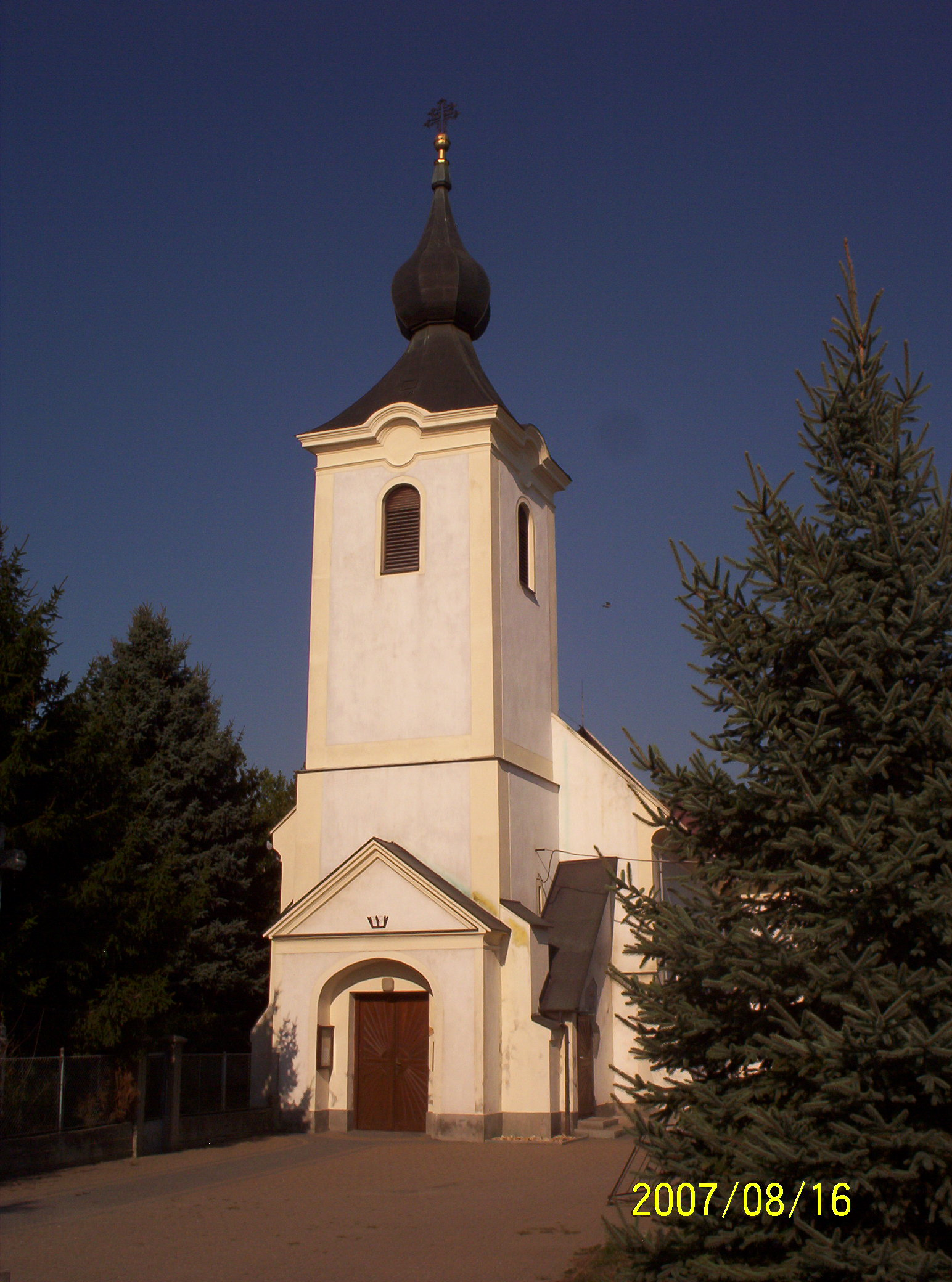 Az ásványi templom (Ásványráró, Győr-Moson-Sopron megye, Magyarország)